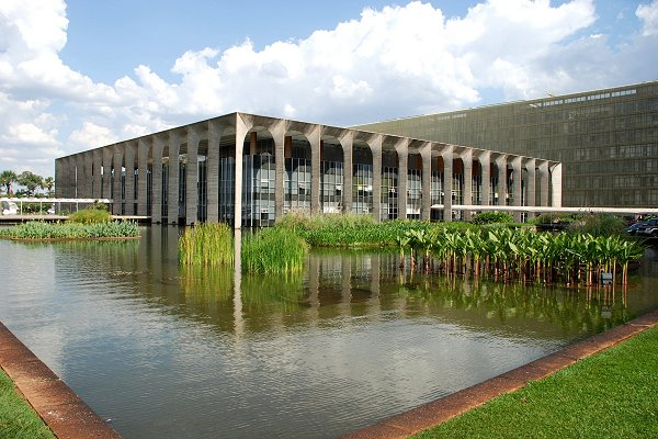 Brasilia - Ministère des Affaires Etrangères